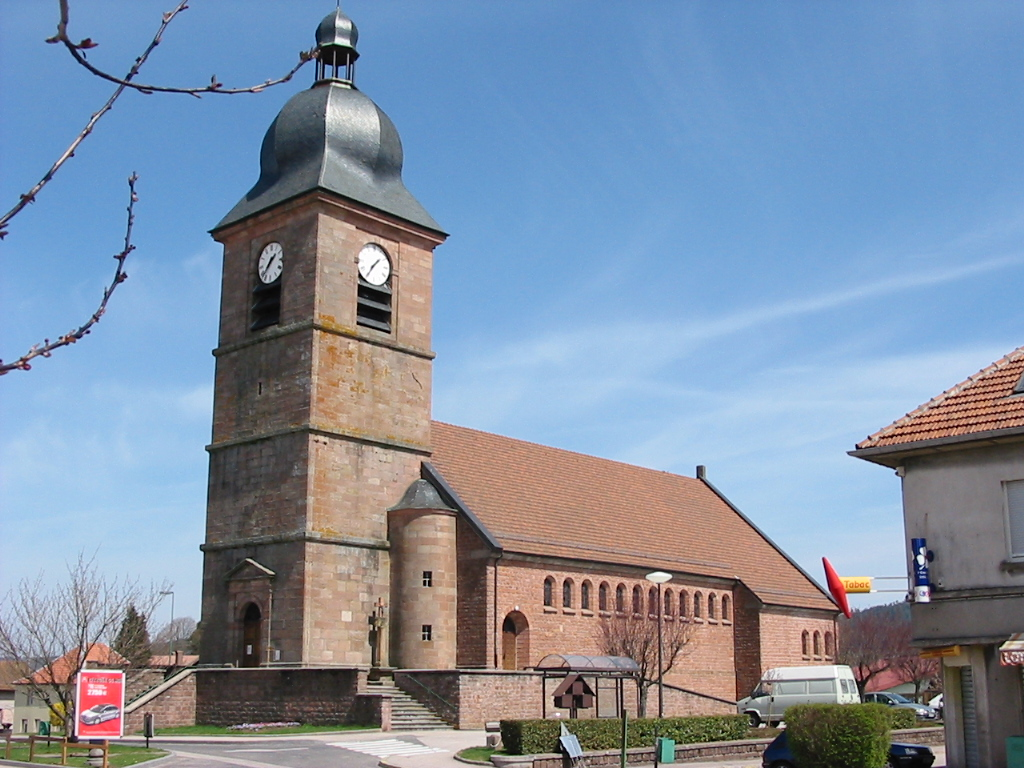 Corcieux Commune des Vosges L'église de l'Assomption Notre-Dame Photographie personnelle, prise le 23 avril 2006 Copyright © Christian Amet